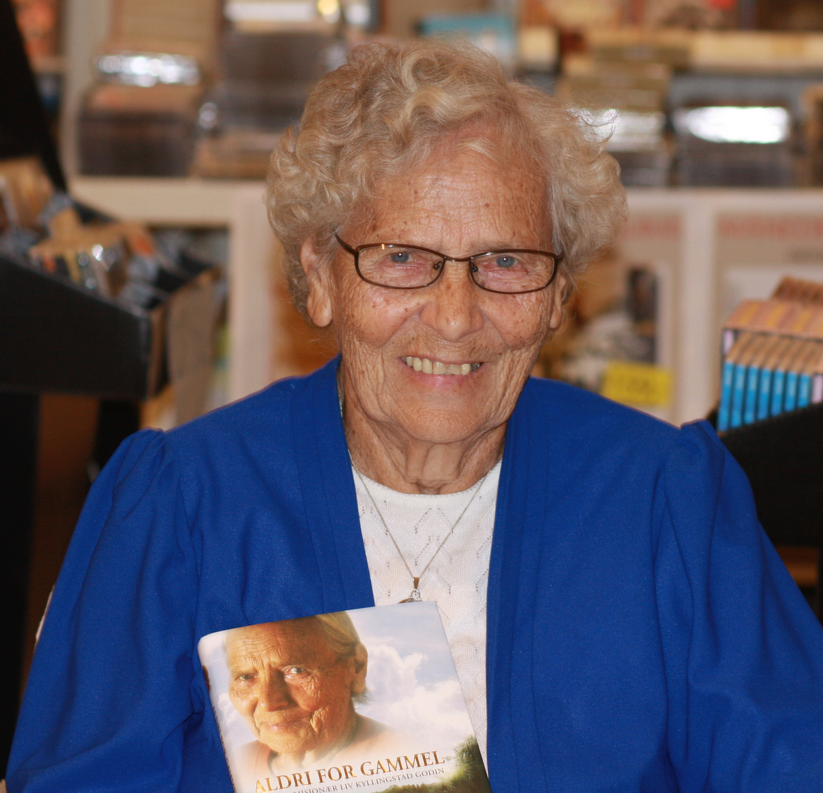 Liv Kyllingstad Godin in Sandnes